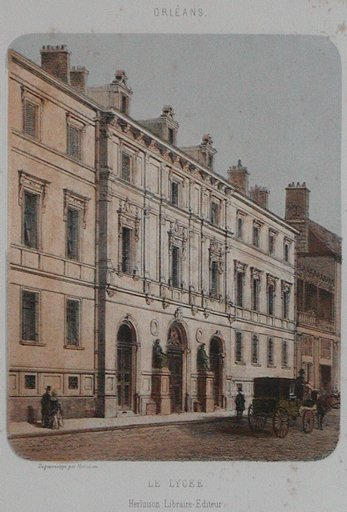 Estampe représentant la façade du lycée d'Orléans au XIXè siècle (Loiret, Centre, France)